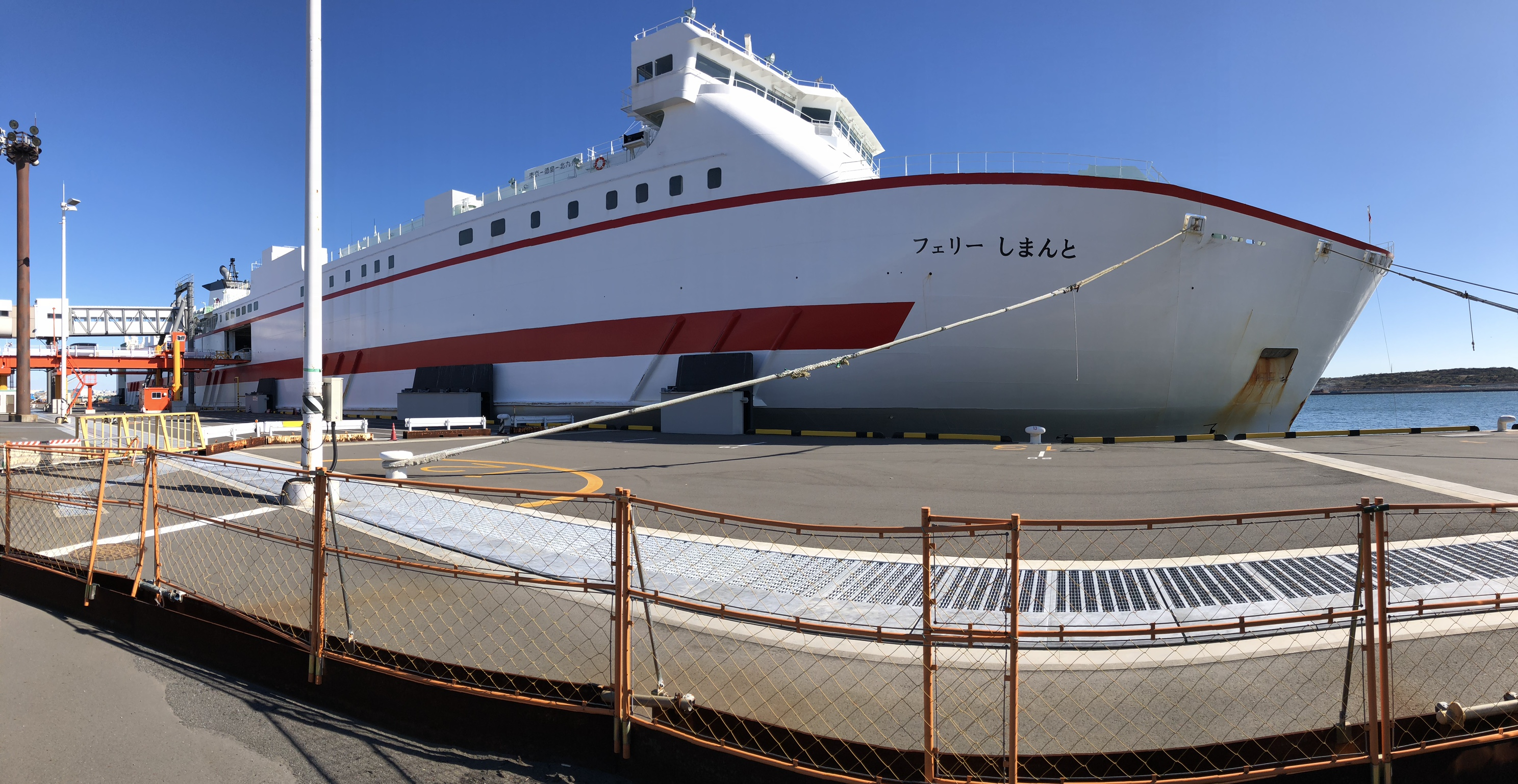 東京港に係留されたフェリーしまんと